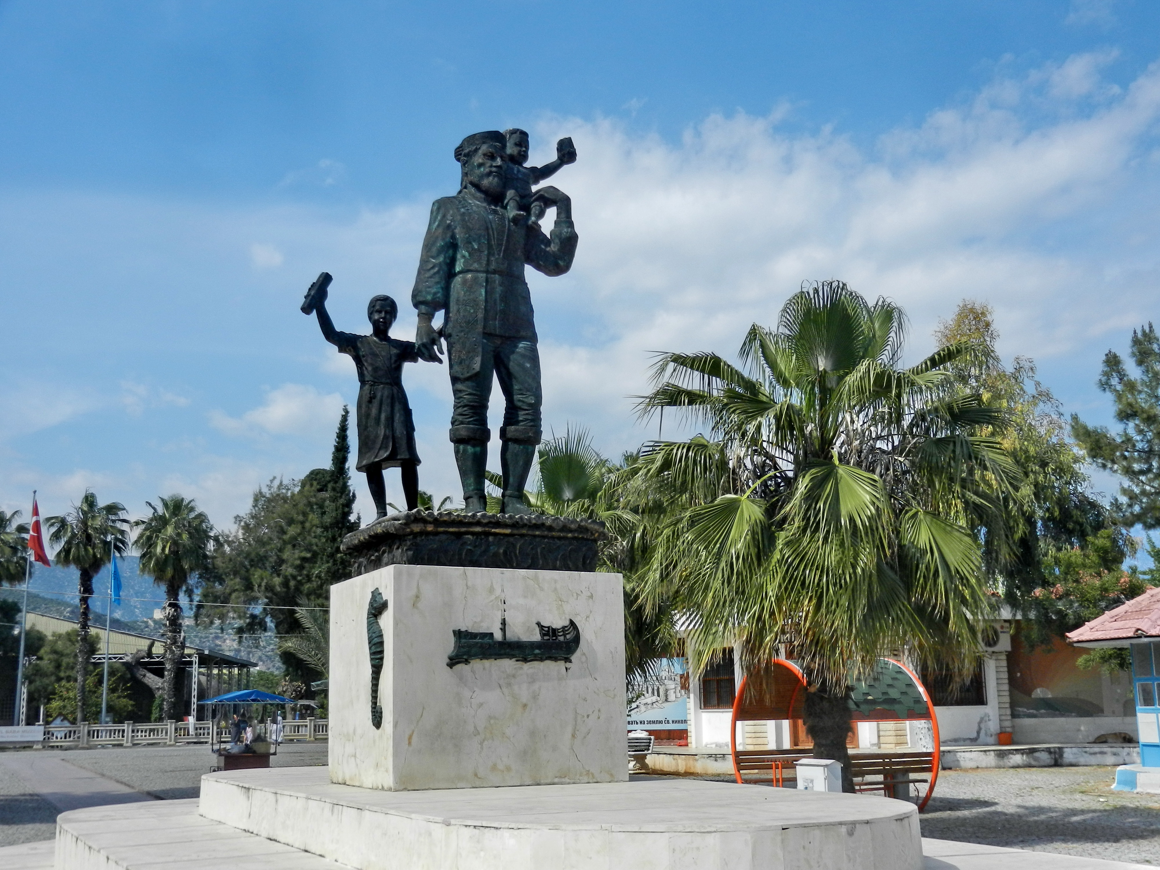 Demre